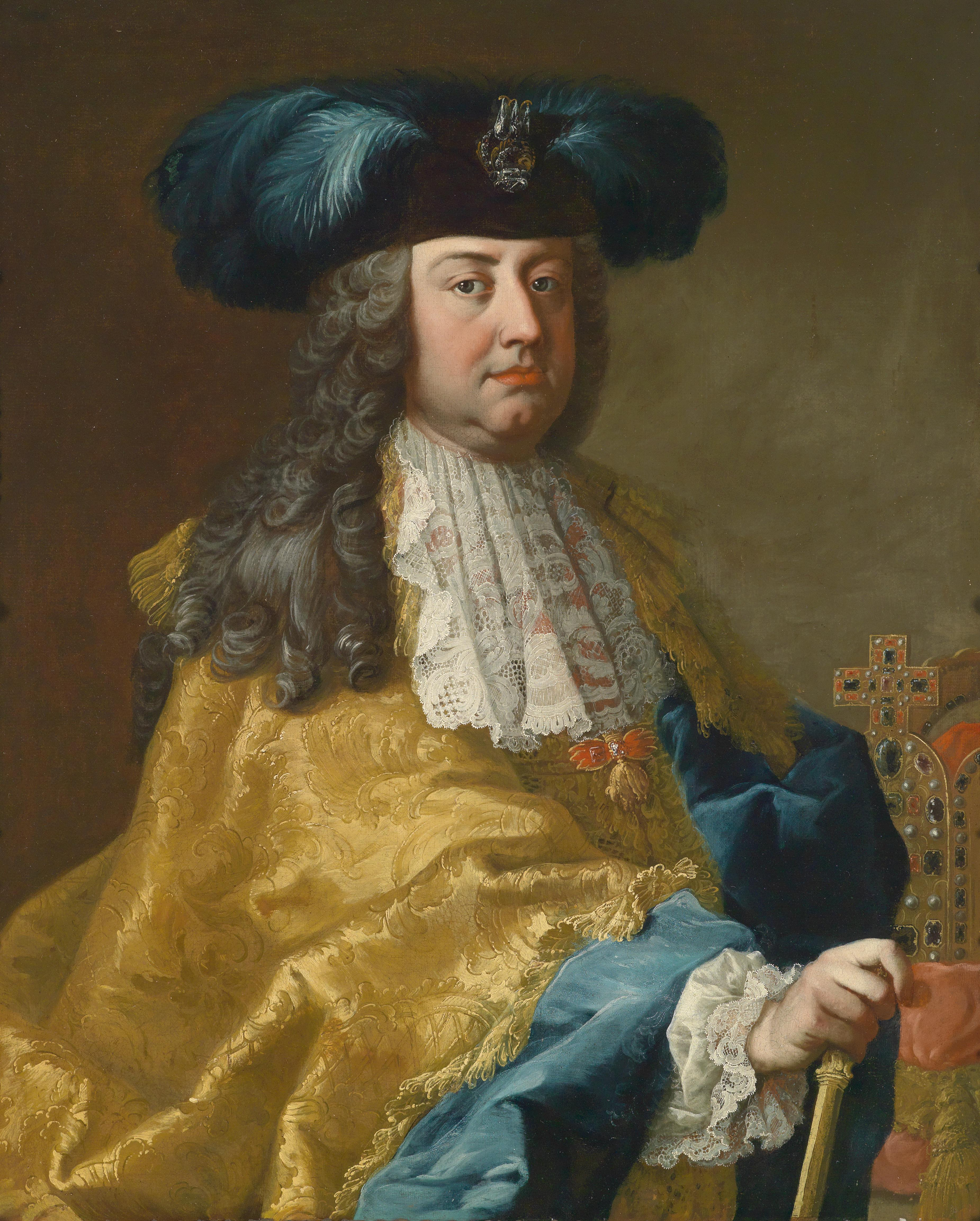 Bildnis des Kaisers Franz I. Stephan. Provenienz: aus österreichischem Adelsbesitz.